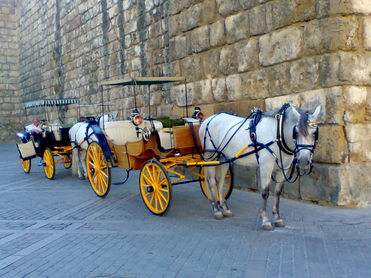 Carruajes de caballo turísticos de Sevilla